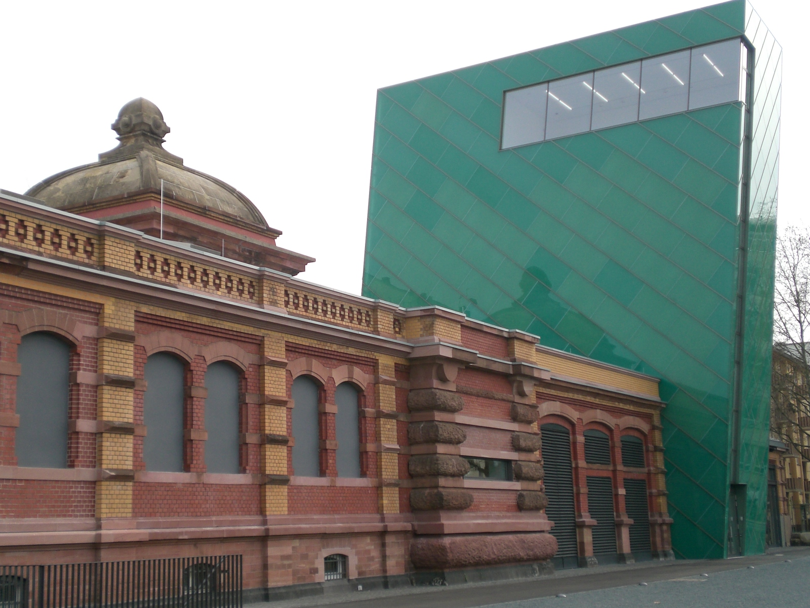 Mainzer Kunsthalle am Zollhafen